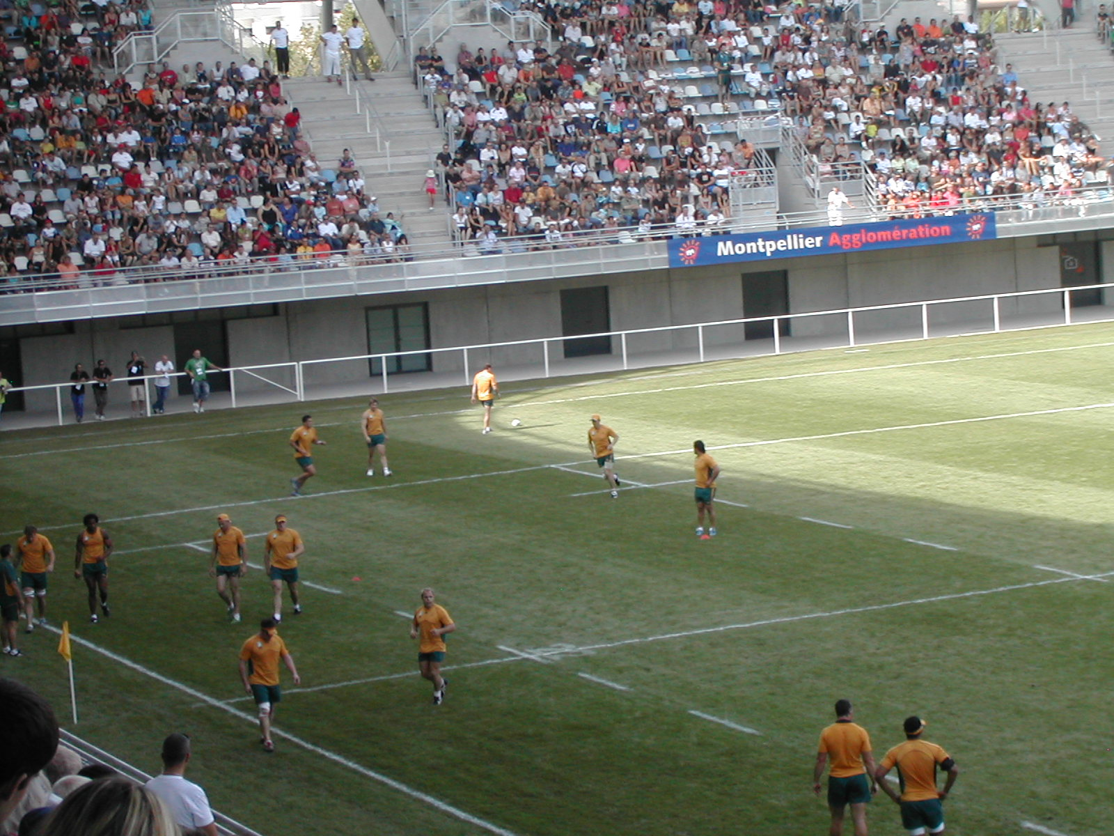 Entraînement public, à Montpellier, des joueurs de rugby à XV australiens. 2 septembre 2007.1